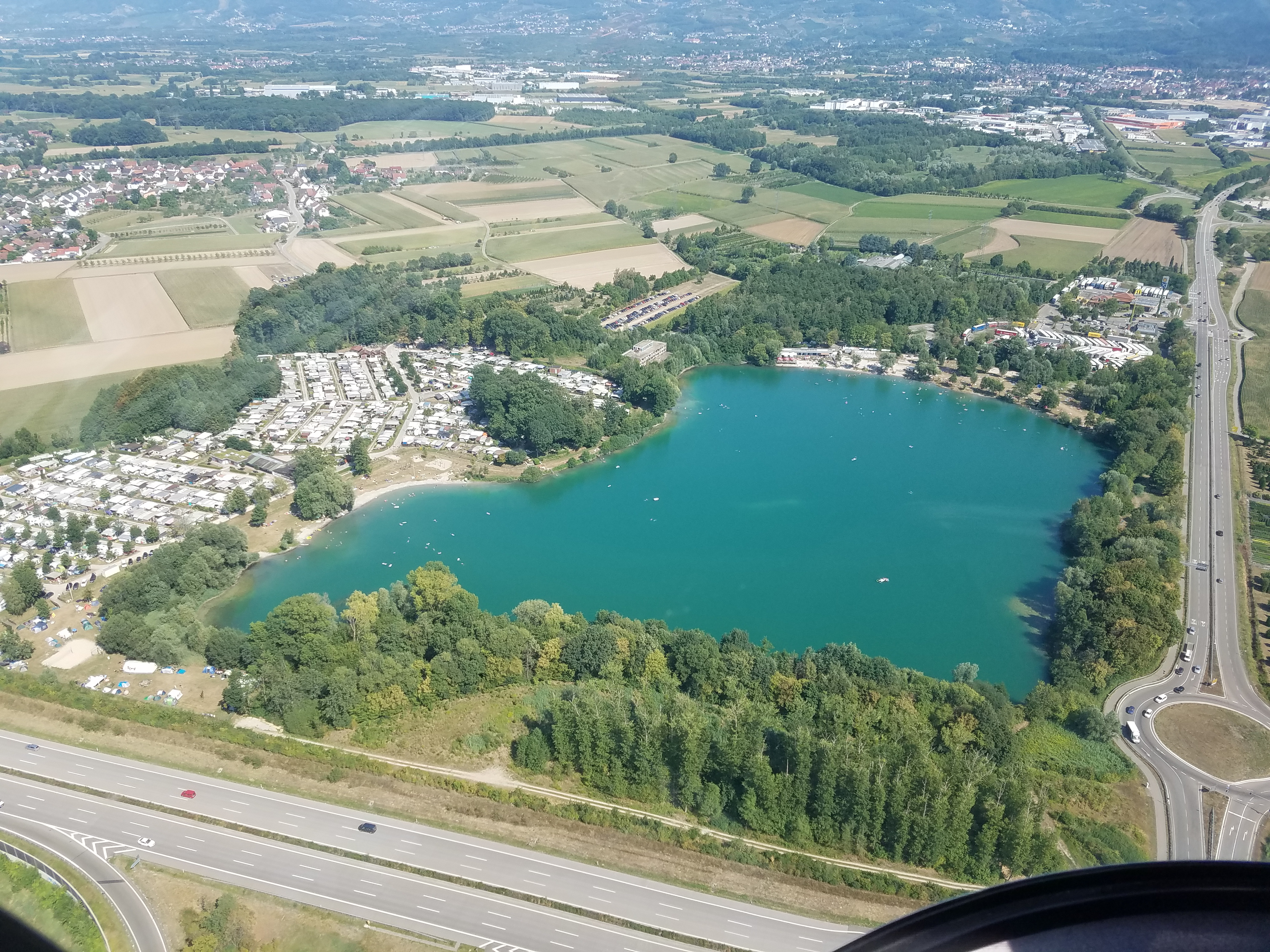 Luftaufnahme vom Achernsee von Westen aus